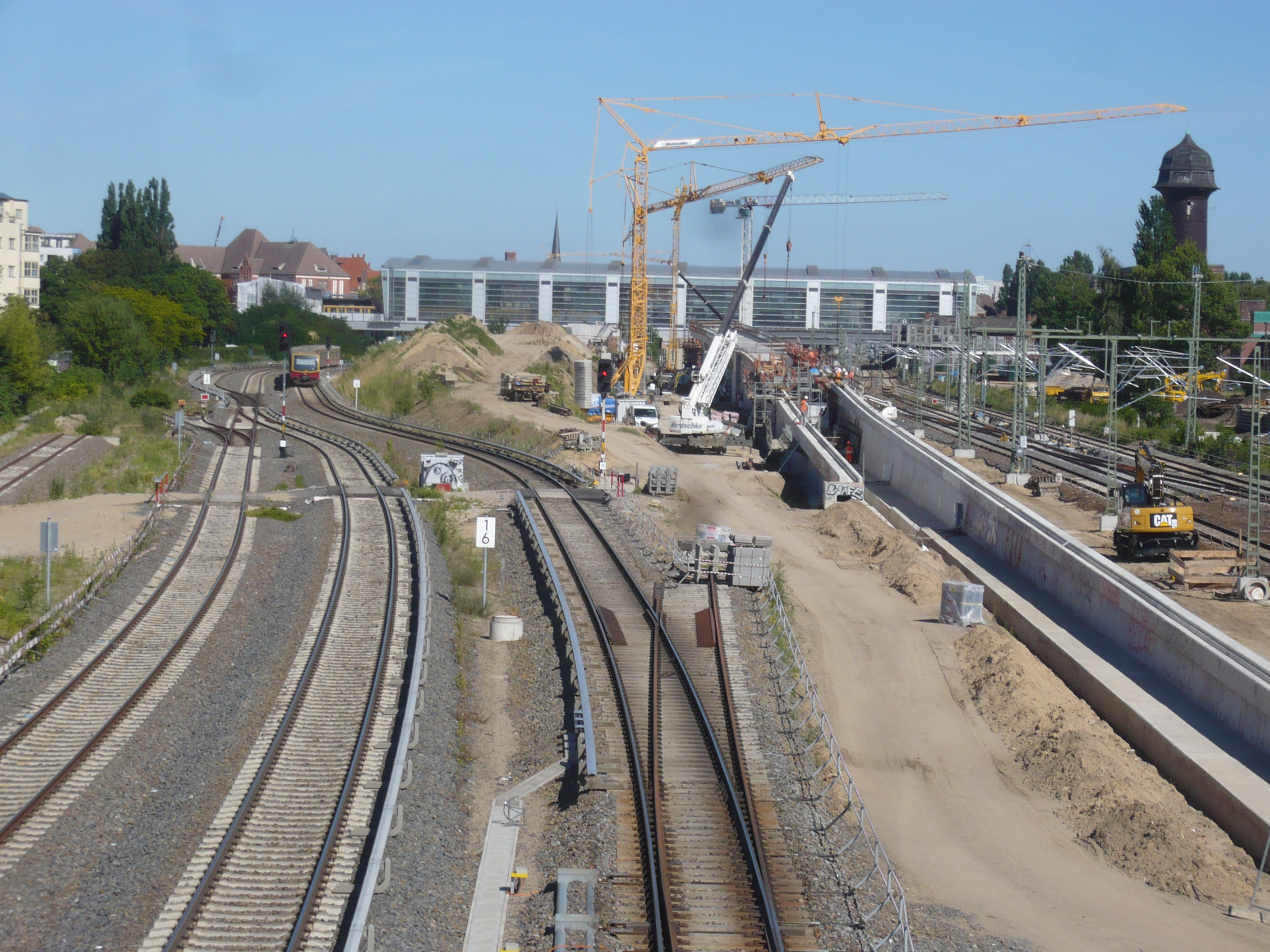 Berlin Ostkreuz Baustelle Südringkurve